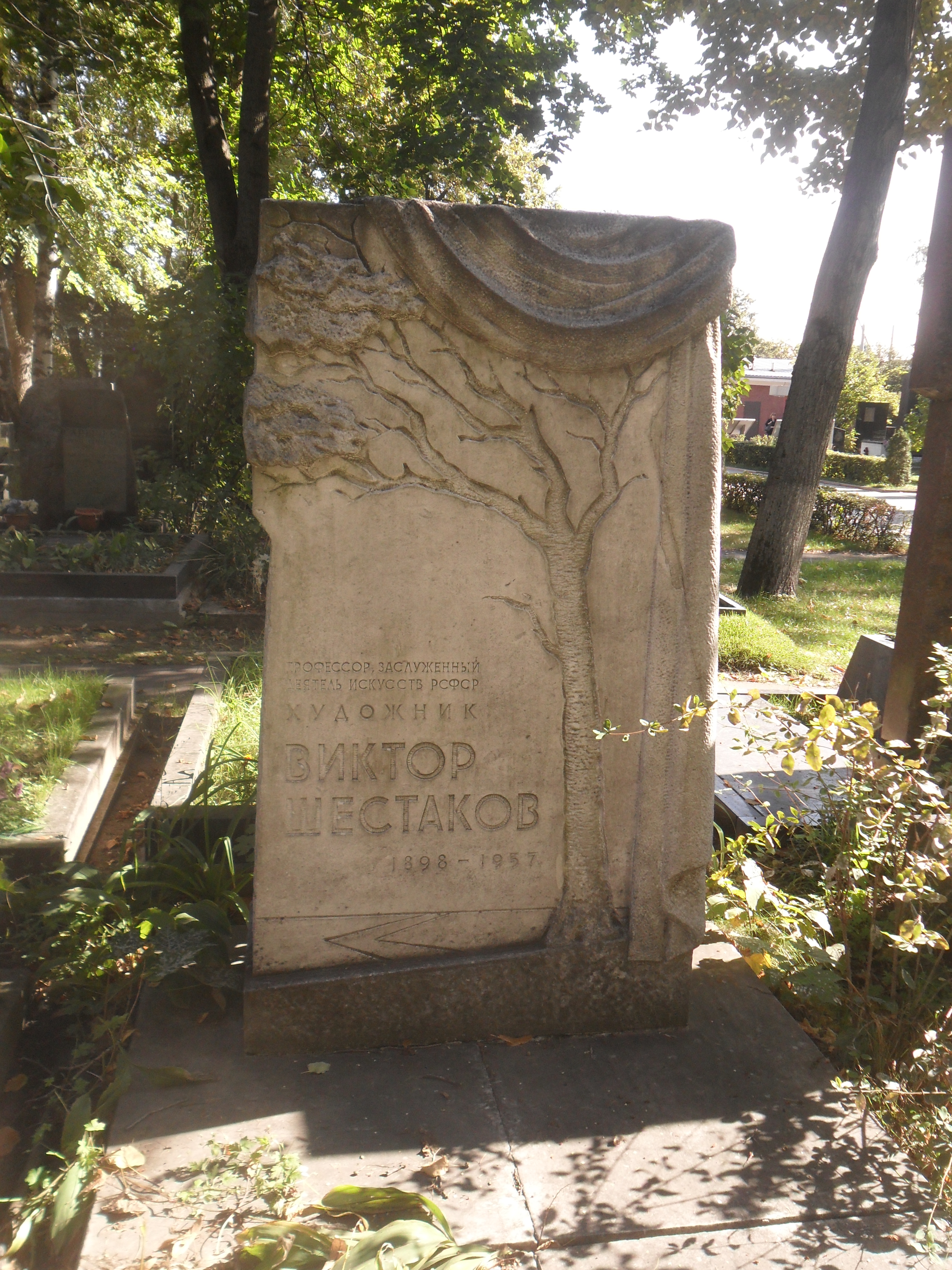 Могила художника Виктора Шестакова на Новодевичьем кладбище Москвы.